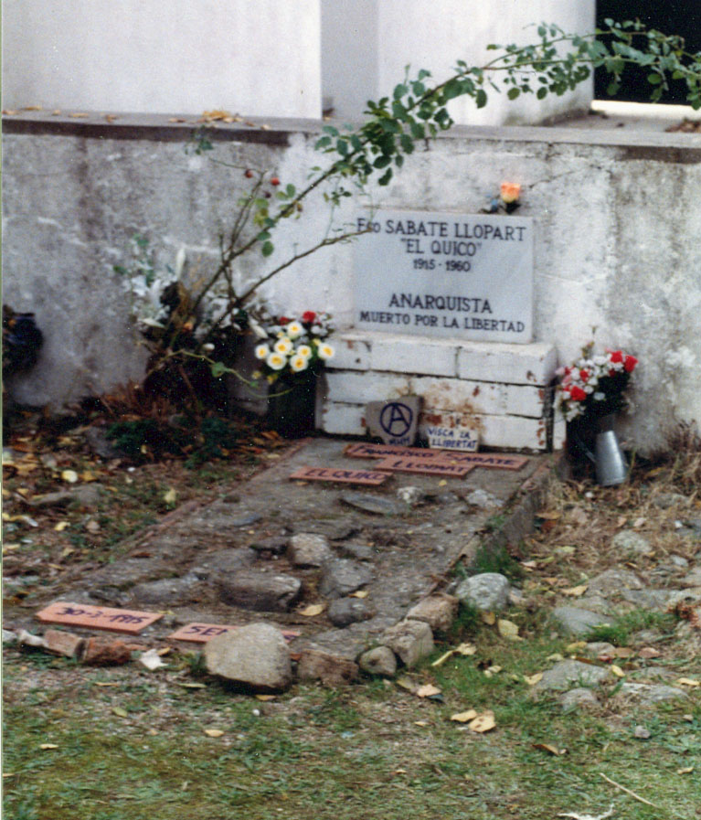 Tomba de Quico Sabaté (Sant Celoni, Cataluña, España)